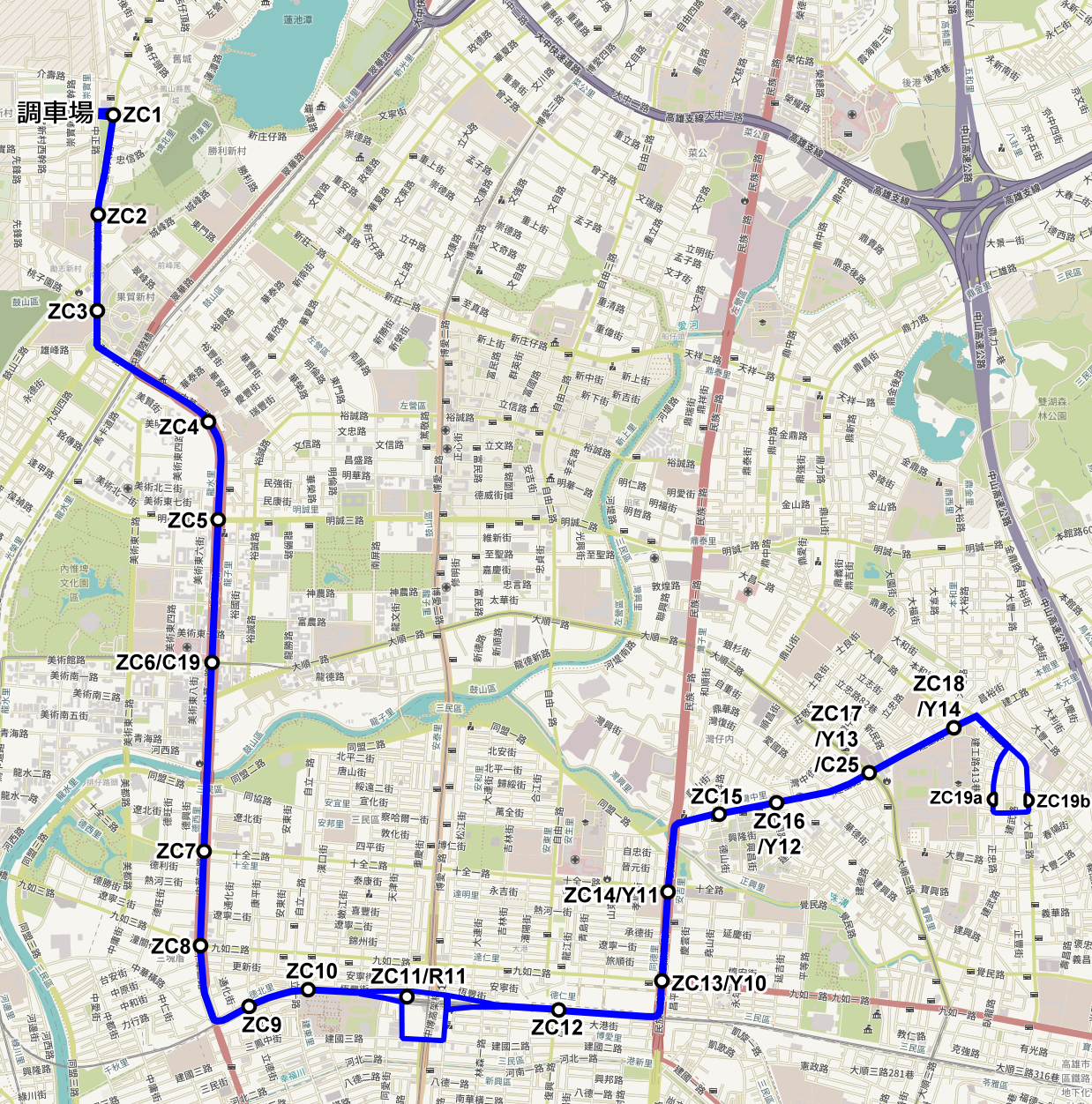 2011年11月《高雄地區整體公車捷運系統路網可行性研究案結案報告書》中的左營建工線